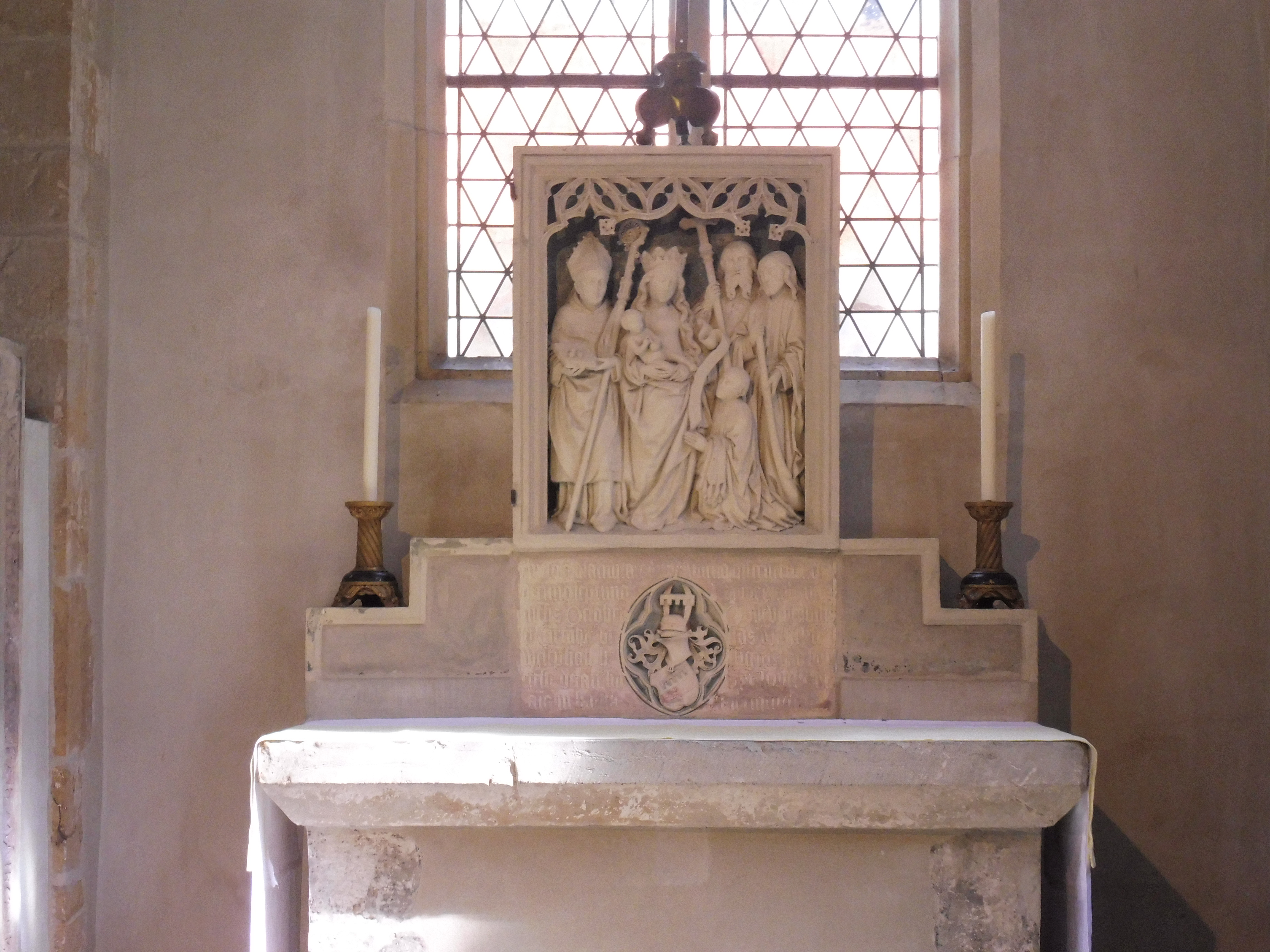 Epitaph Wilhelm von Westphalen in der westphaklenkapelle des Paderborner Doms